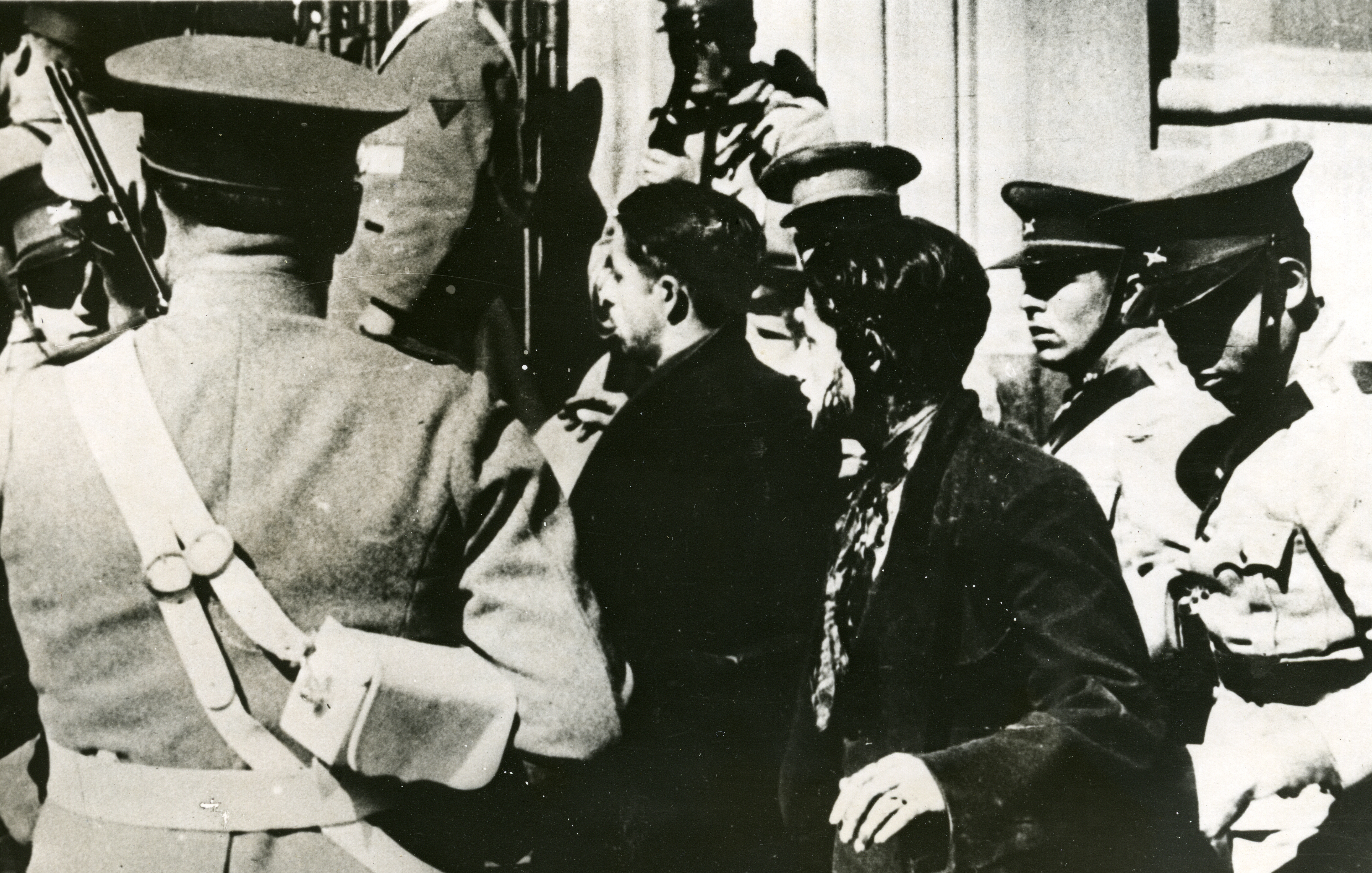 Santiago. Voici deux nazis capturés par la police fédérale lors du mouvement du révolte qui se produit dernièrement au Chili. Ces deux prisonniers seront tués dans quelques minutes, car ils furent pris entre les feux des nazis et de la police lors de l'assaut du siège nazi.